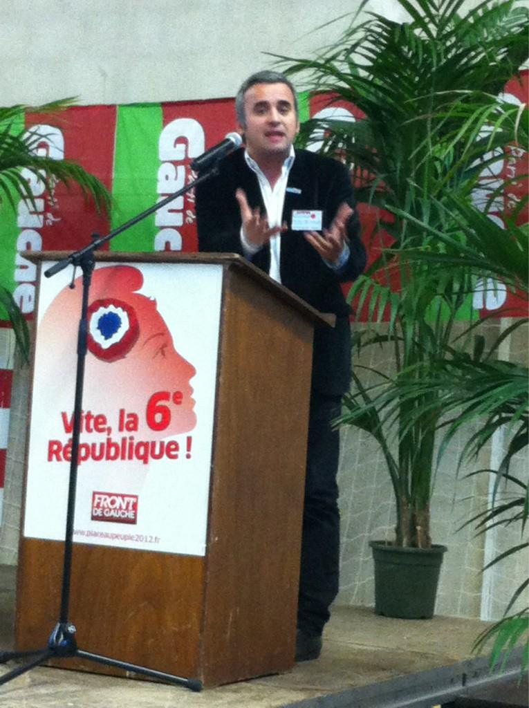 Alexis Corbière, Parti de Gauche, à la tribune du CN du PG, octobre 2012